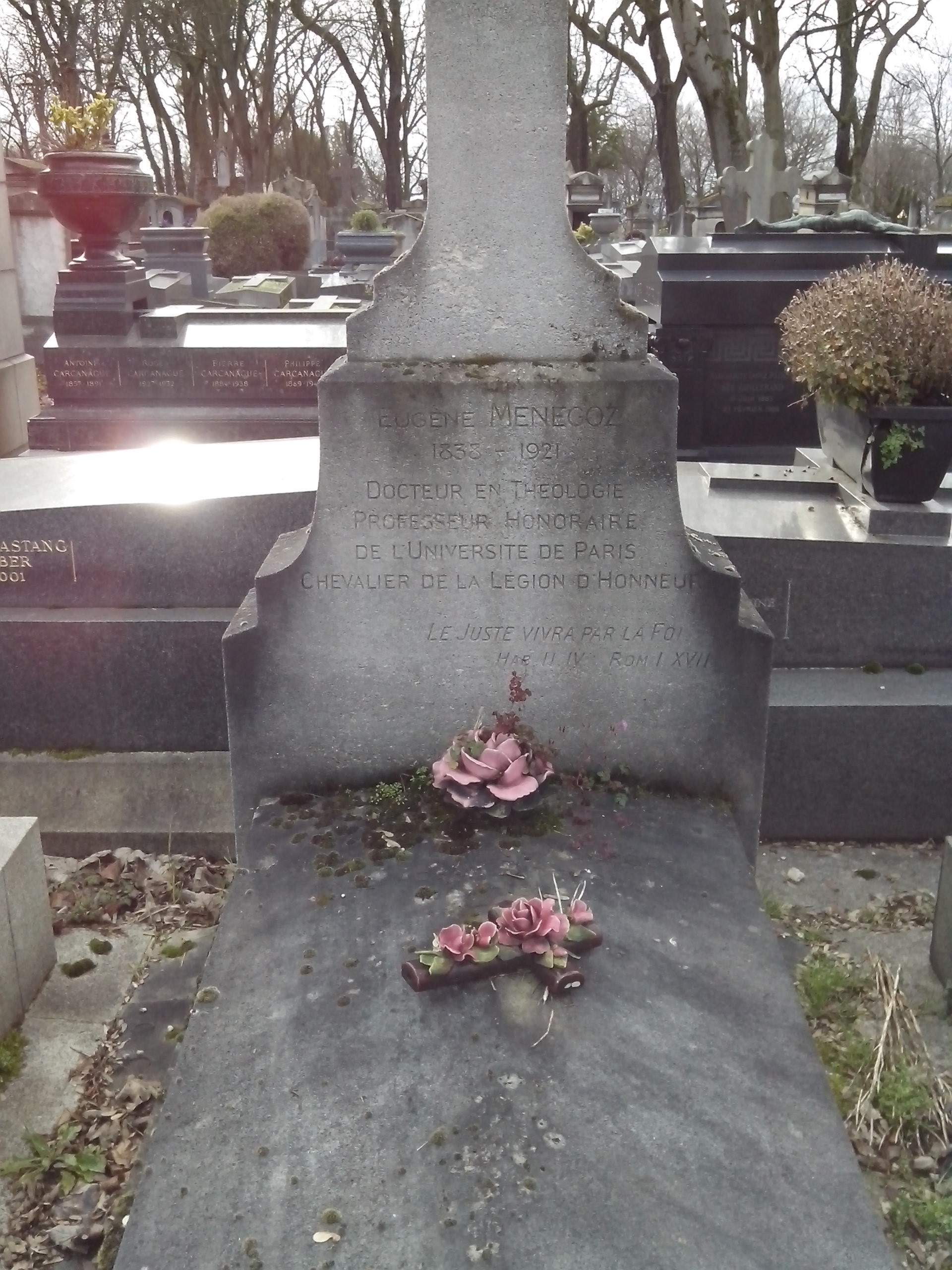 Sépulture d'Eugène Ménégoz (1838-1921), pasteur luthérien français et le fondateur du symbolo-fidéisme, une tendance théologique protestante libérale qui met en valeur l'attachement au symbolique et à la foi en Dieu plutôt que l'attachement à des dogmes.